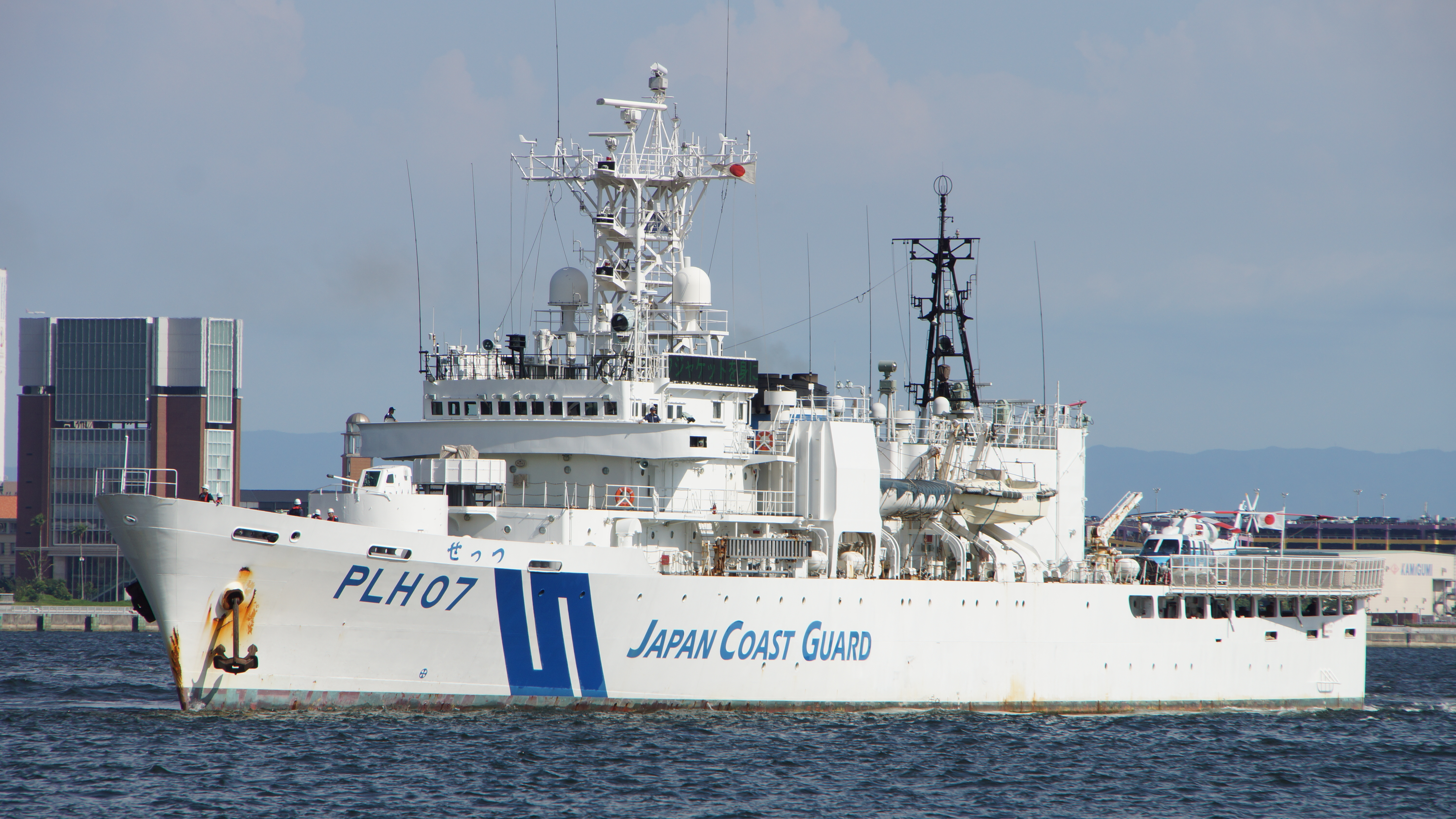 海上保安庁 ヘリコプター1機搭載型巡視船せっつ（PLH-07） 左舷前面。2017年7月22日 神戸港にて。